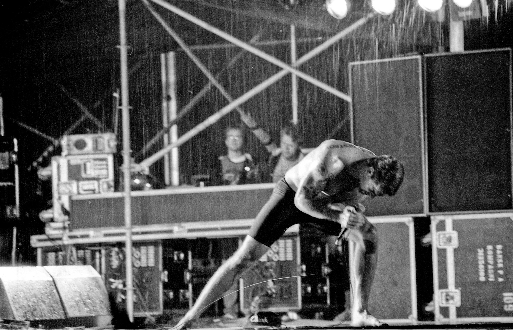 Scen: Hawaii Mitt Hultsfred